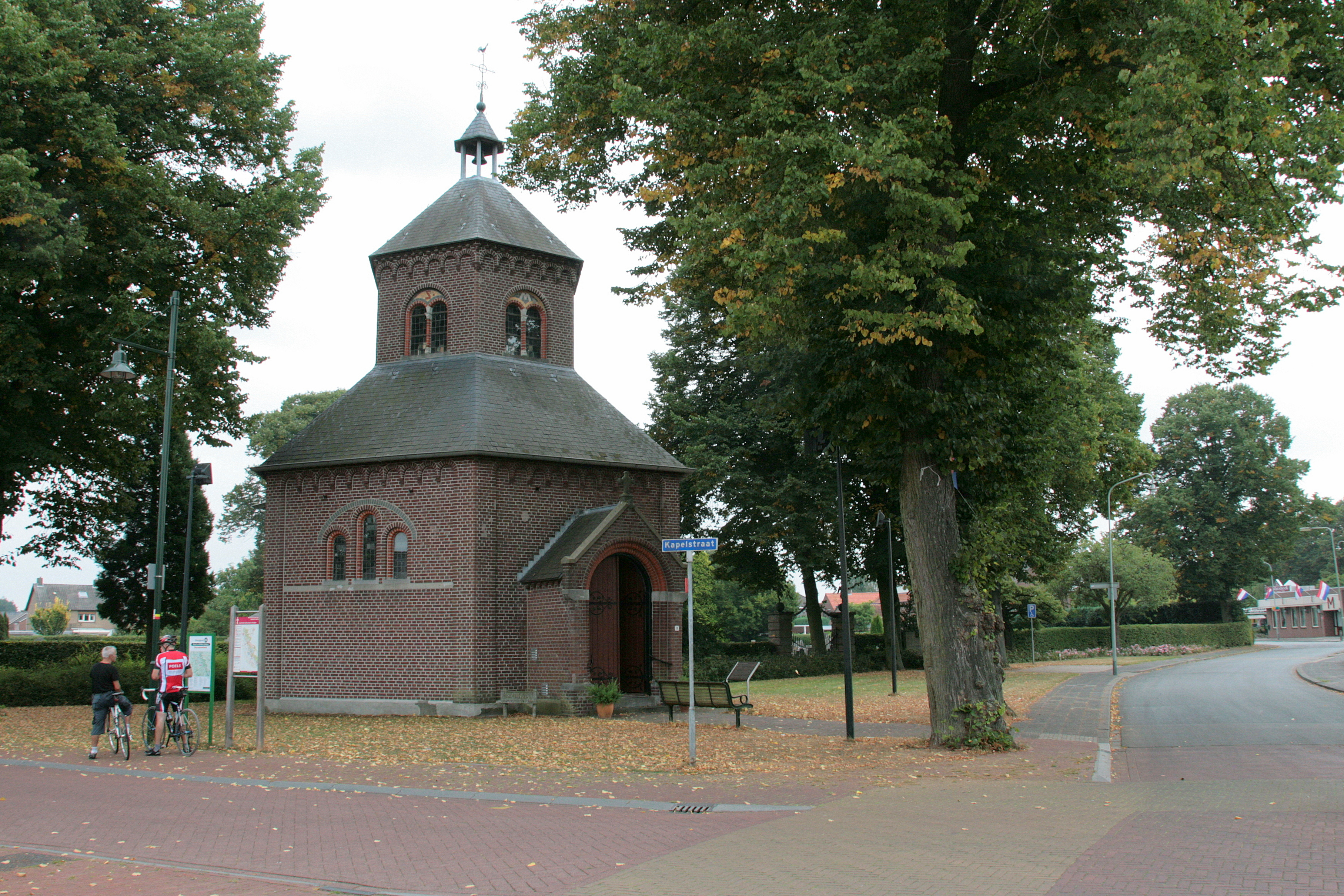 De Mariakapel bestaat uit een in 1606 gebouwde kleine kruisvormige kapel met dakruiter en een in 1909 aangebouwde grote zeszijdige neogotische kapel met lantaarn, uitbouw en portaal.